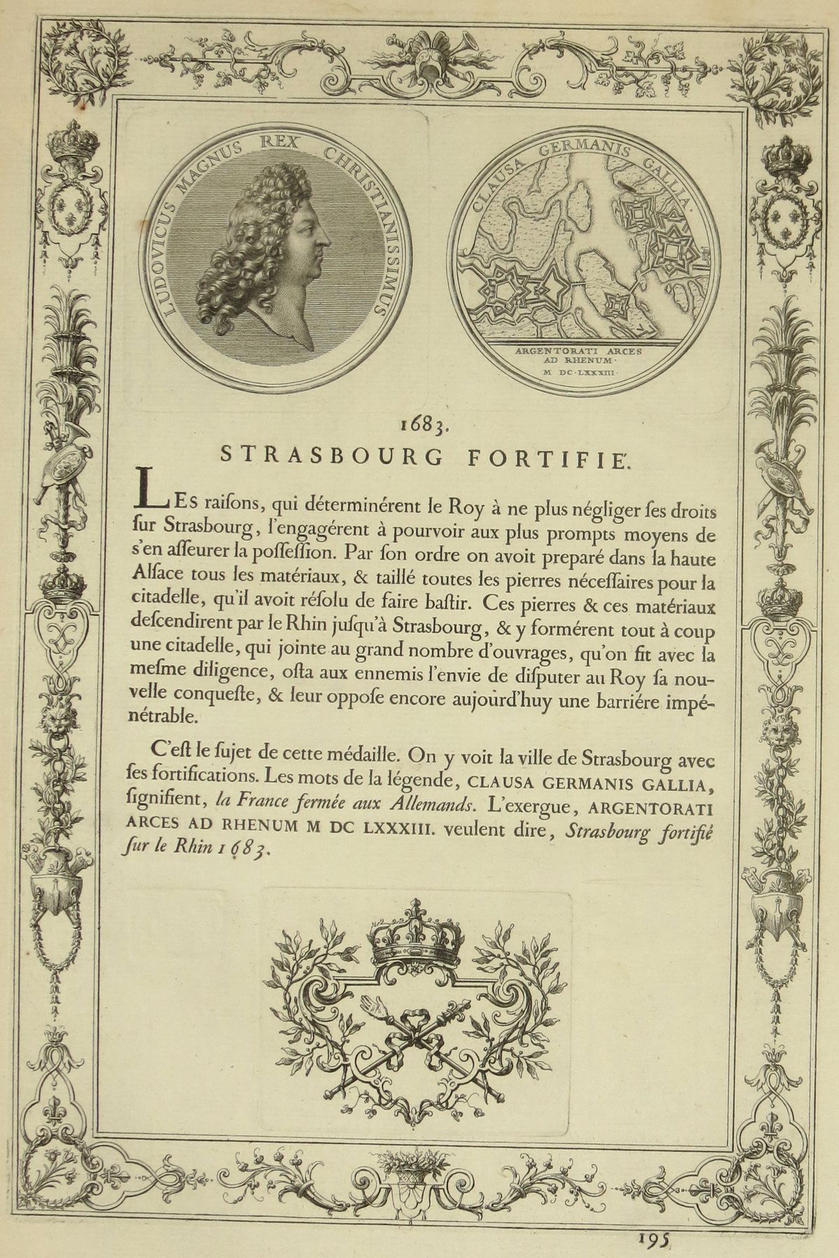 Document relatant la création de la médaille commémorant la fortification de Strasbourg en 1683, extrait de "Médailles sur les principaux évènements du règne entier de Louis le Grand, avec des explications historiques." par "Académie des inscriptions et belles-lettres" 1723